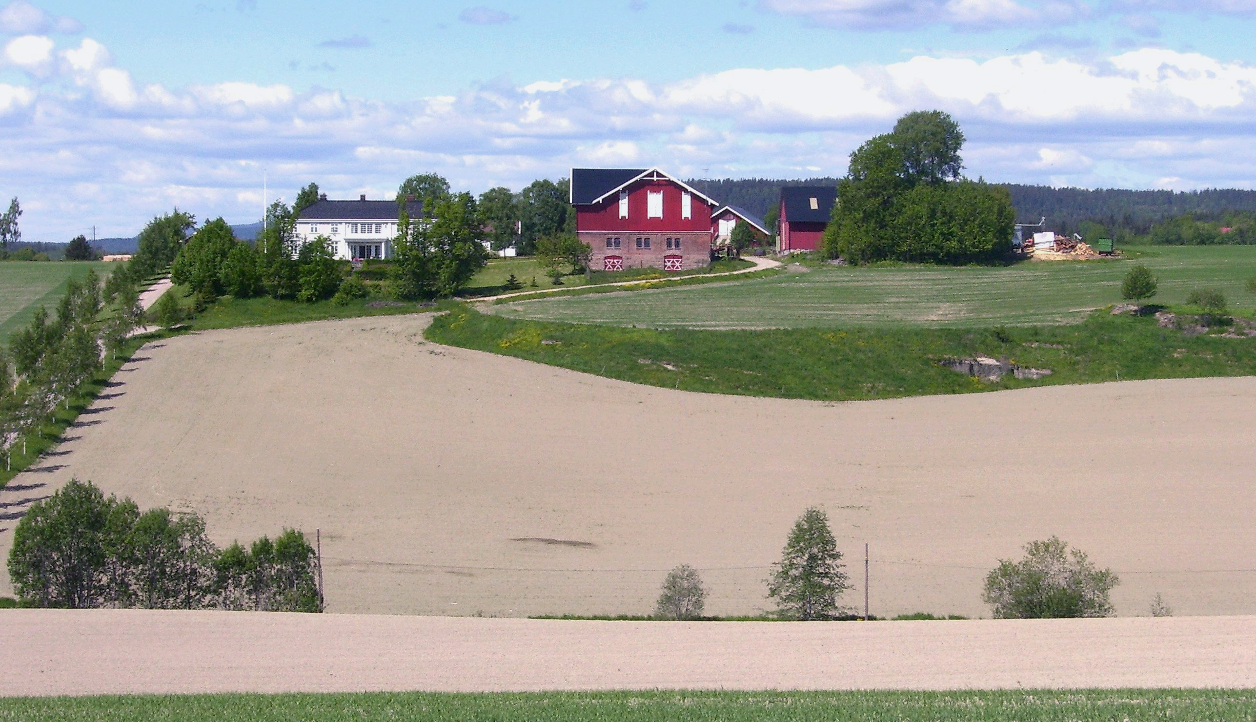 Østre Grini. Røyken kommune